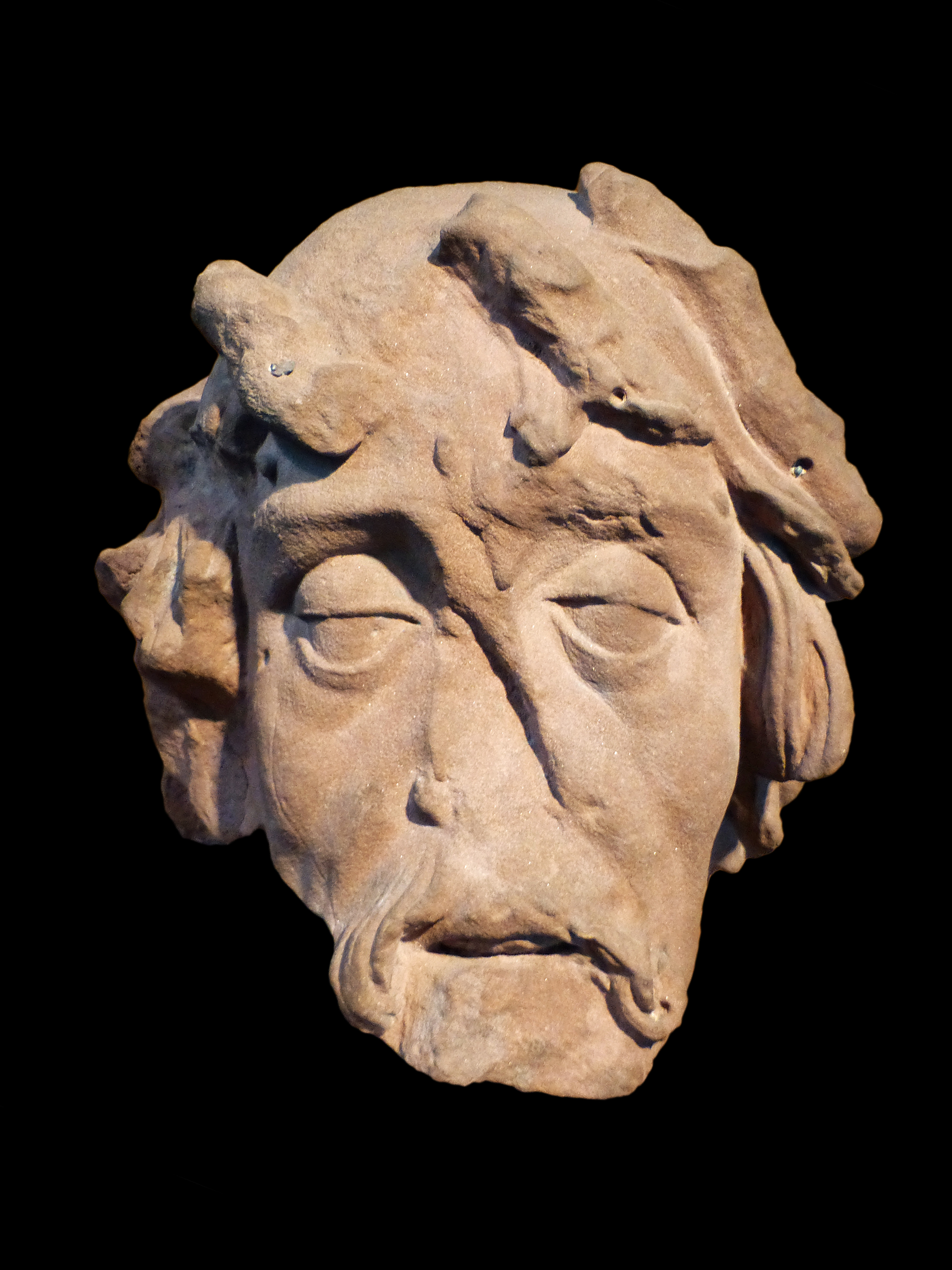 Musée historique de Haguenau (Bas-Rhin) : tête de Christ de la fin du XVe siècle. Elle pourrait provenir du calvaire réalisé par le sculpteur strasbourgeois Lux Kotter pour le cimetière Saint-Georges de Haguenau en 1477-1478.